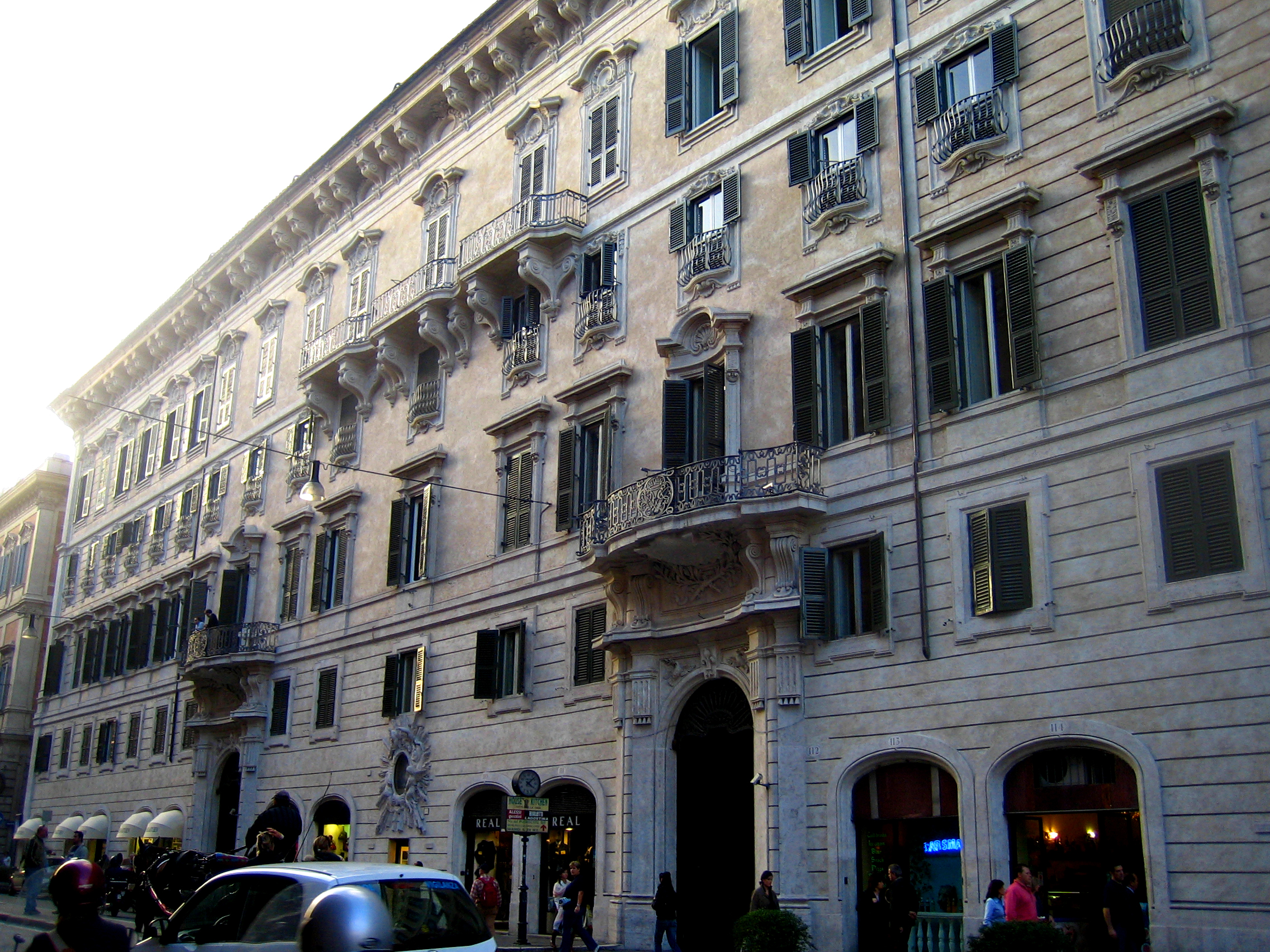 Roma, Palazzo Doria Pamphilj, lato Via del CorsoPalazzo Doria Pamphilj a Roma, facciata su Via del Corso